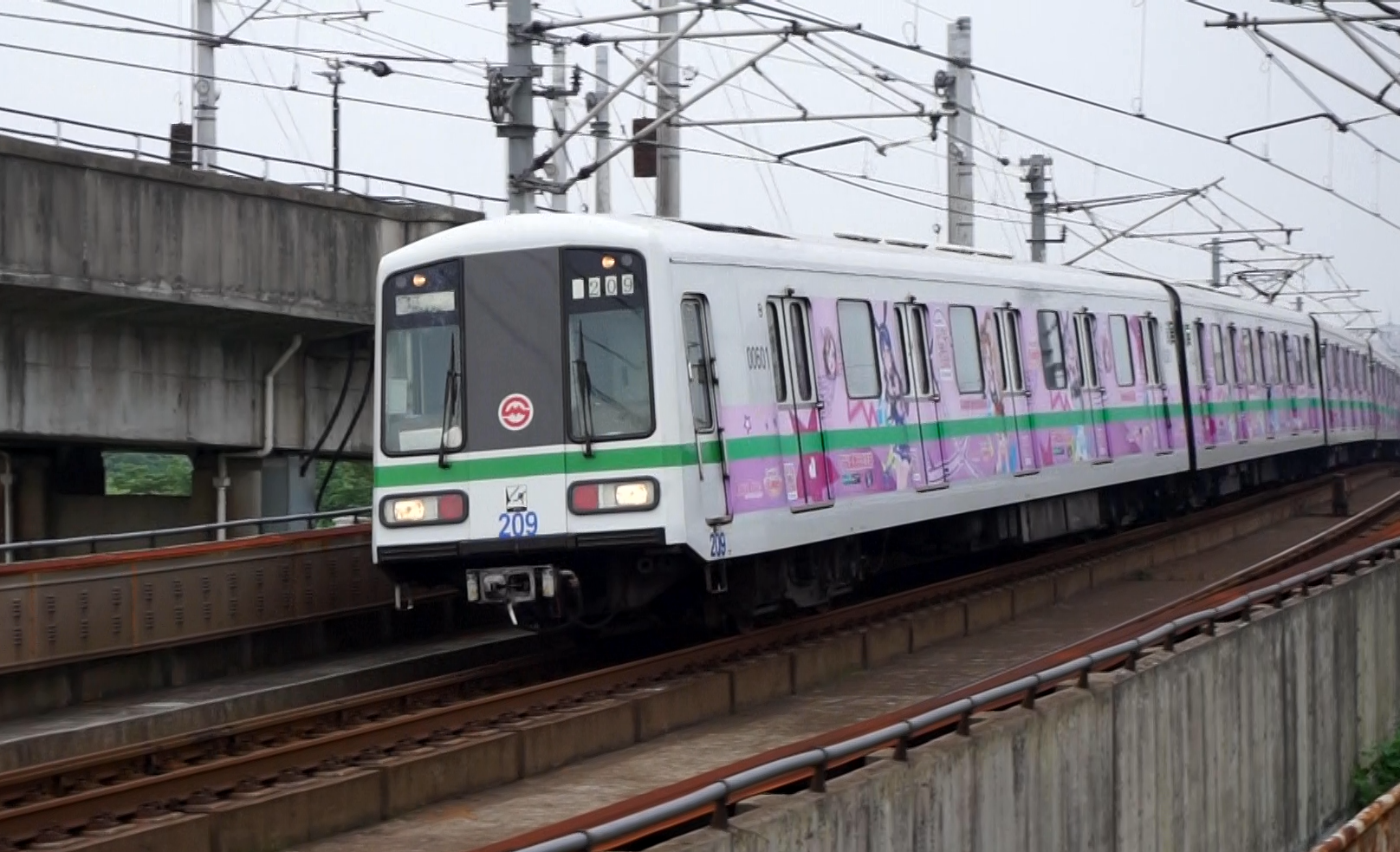 LoveLive列车上行通过龙阳路-张江高科之间高架